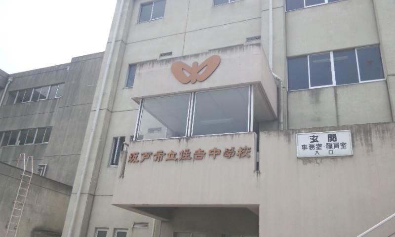 校舎裏の入口です。